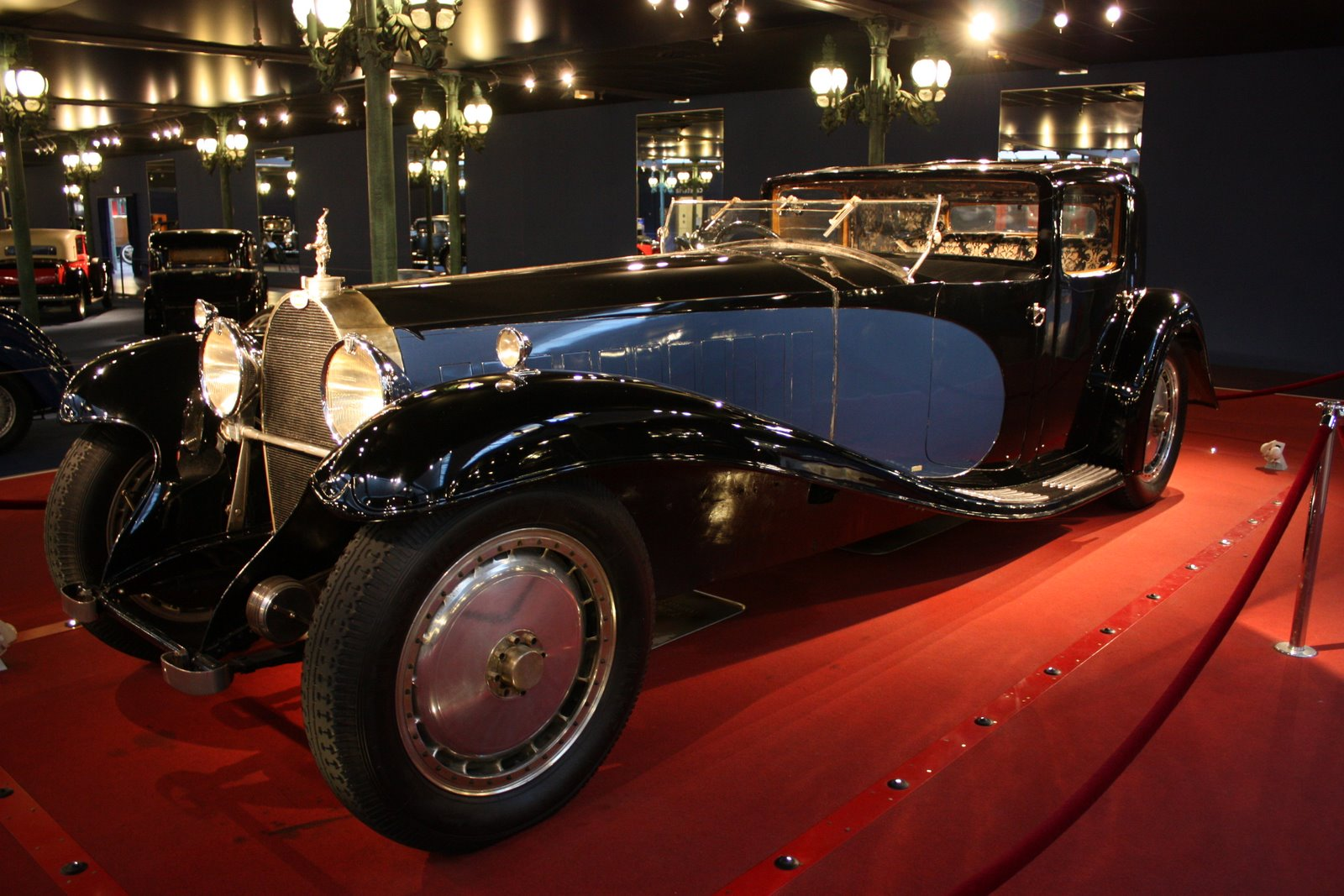 Bugatti Royale Coupé Napoléon. La première des 6 Bugatti Royales qui ont été construites (2 des 6 sont dans ce musée). 1929 or 1930.